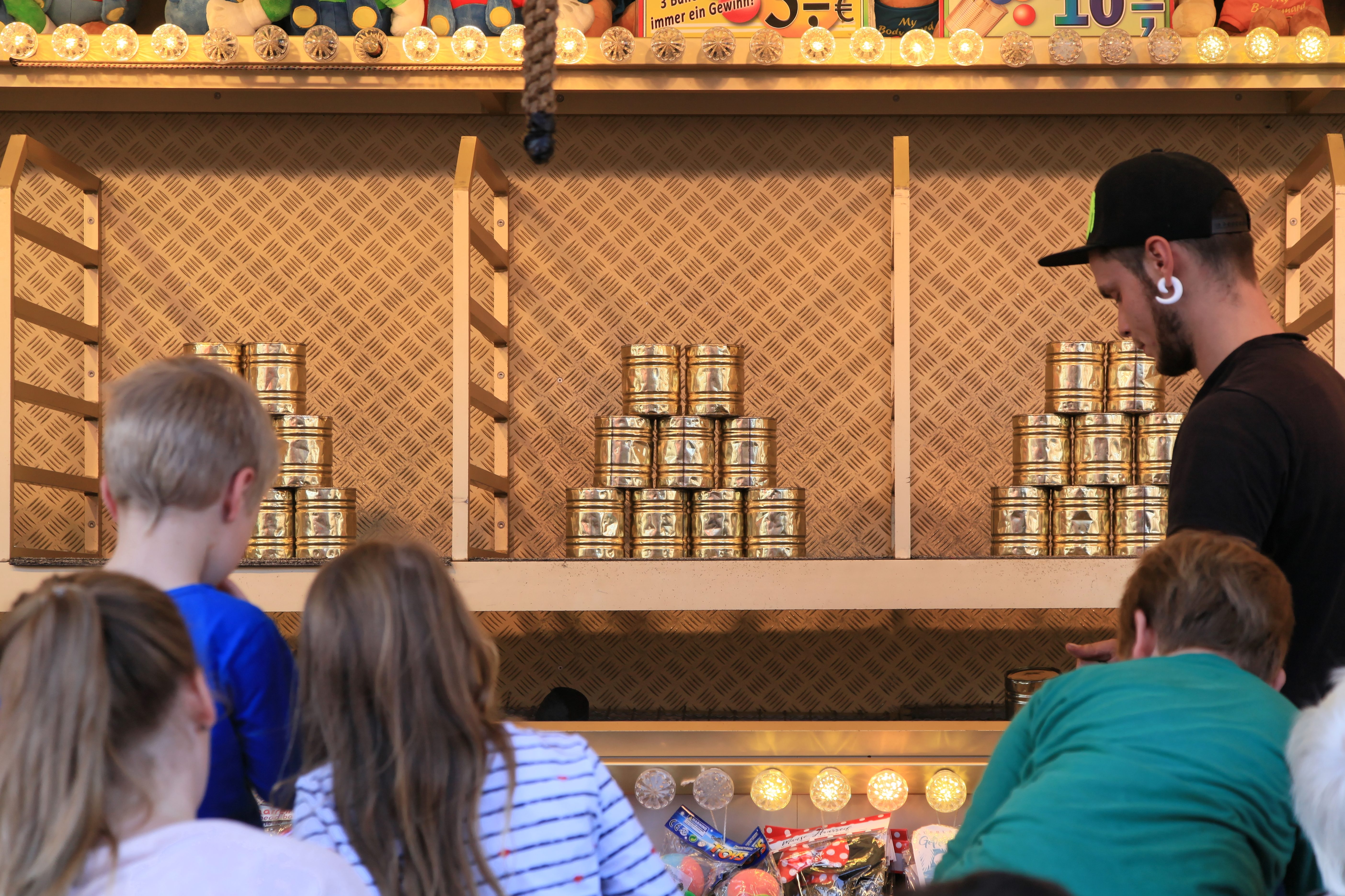 Gallimarkt 2018, Große Bleiche in Leer (Ostfriesland)